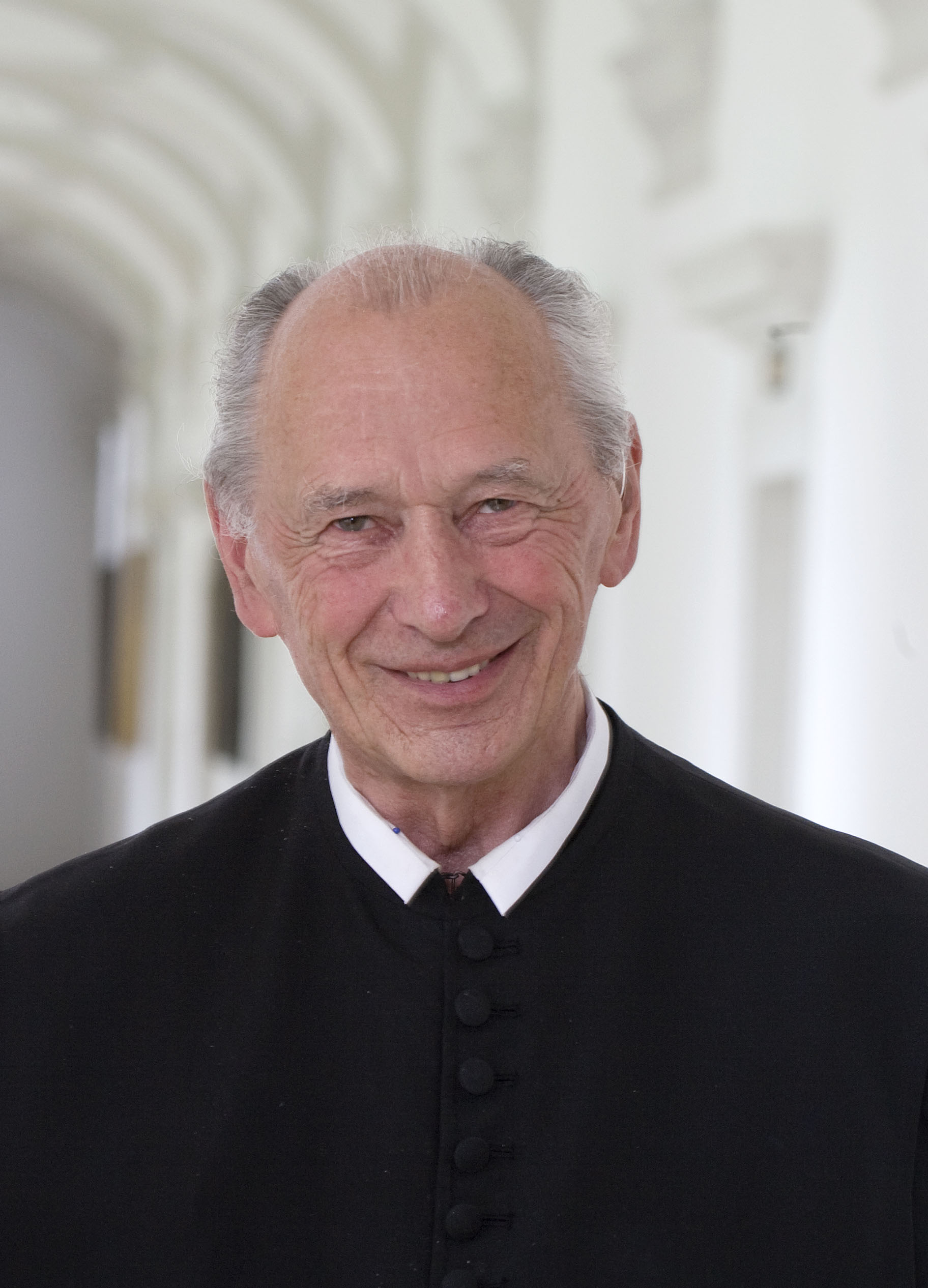 Abt em. Oddo Bergmair war von 1982 bis 2007 Abt des Stiftes Kremsmünster.